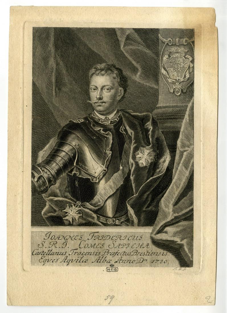 Беларуская (тарашкевіца): Партрэт Яна Фрыдэрыка Сапегі (Jan Fryderyk Sapieha) гербу «Ліс» (1680—1751), дзяржаўнага і вайсковага дзеяча Вялікага Княства Літоўскага, кашталяна менскага і троцкага, канцлера літоўскага.